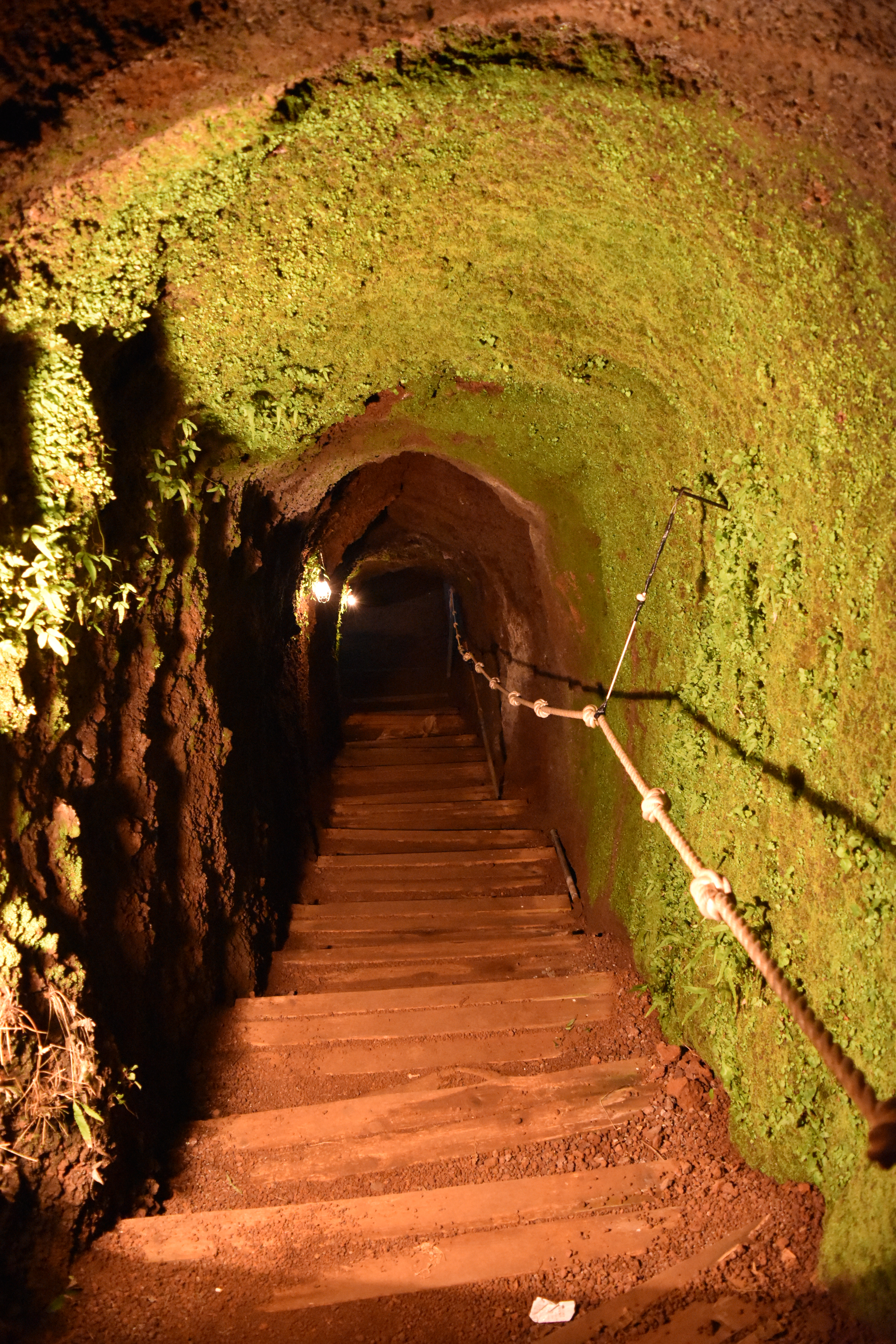 가마오름 일제 지하 기지